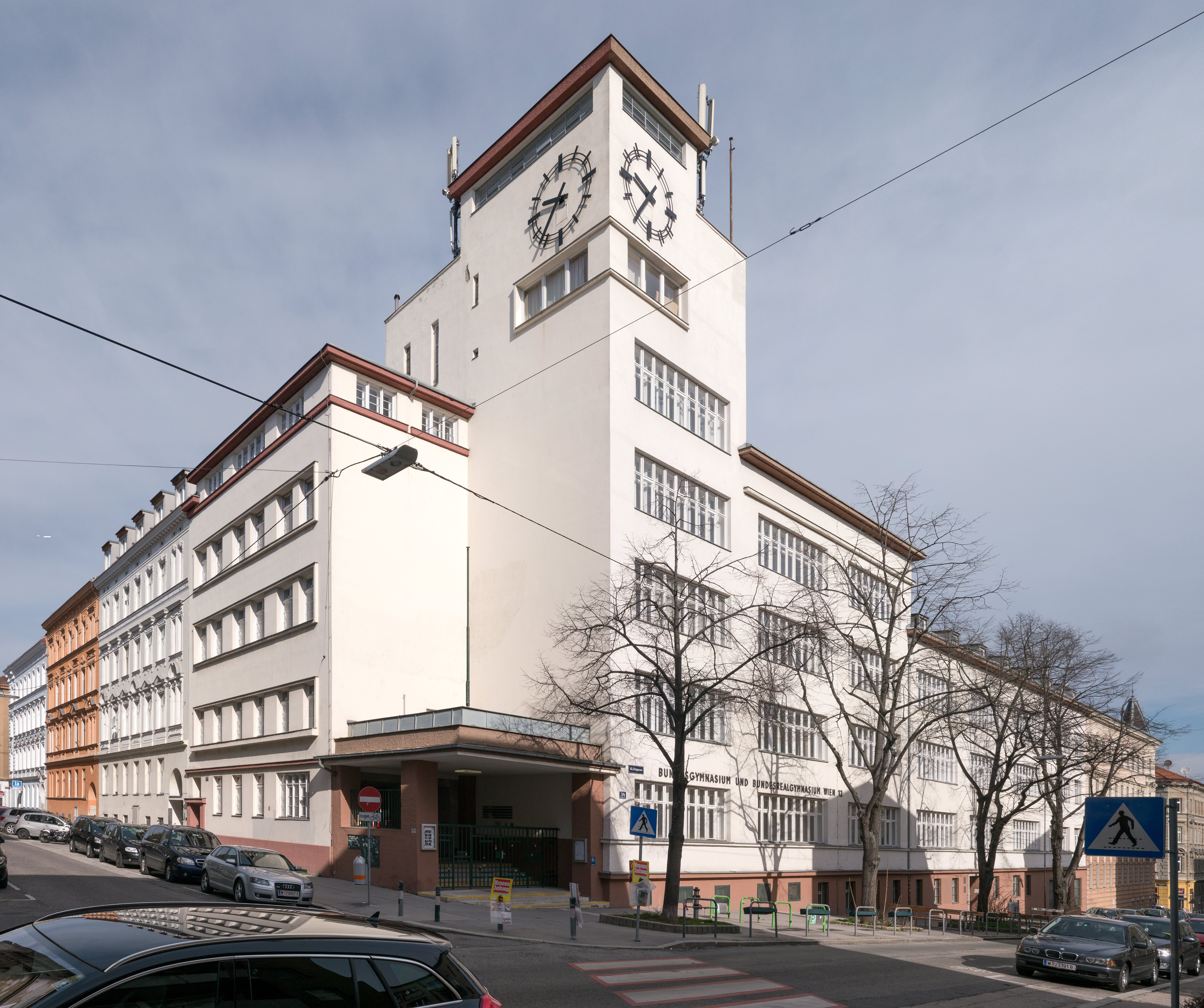 Bundesrealgymnasium Wien XII